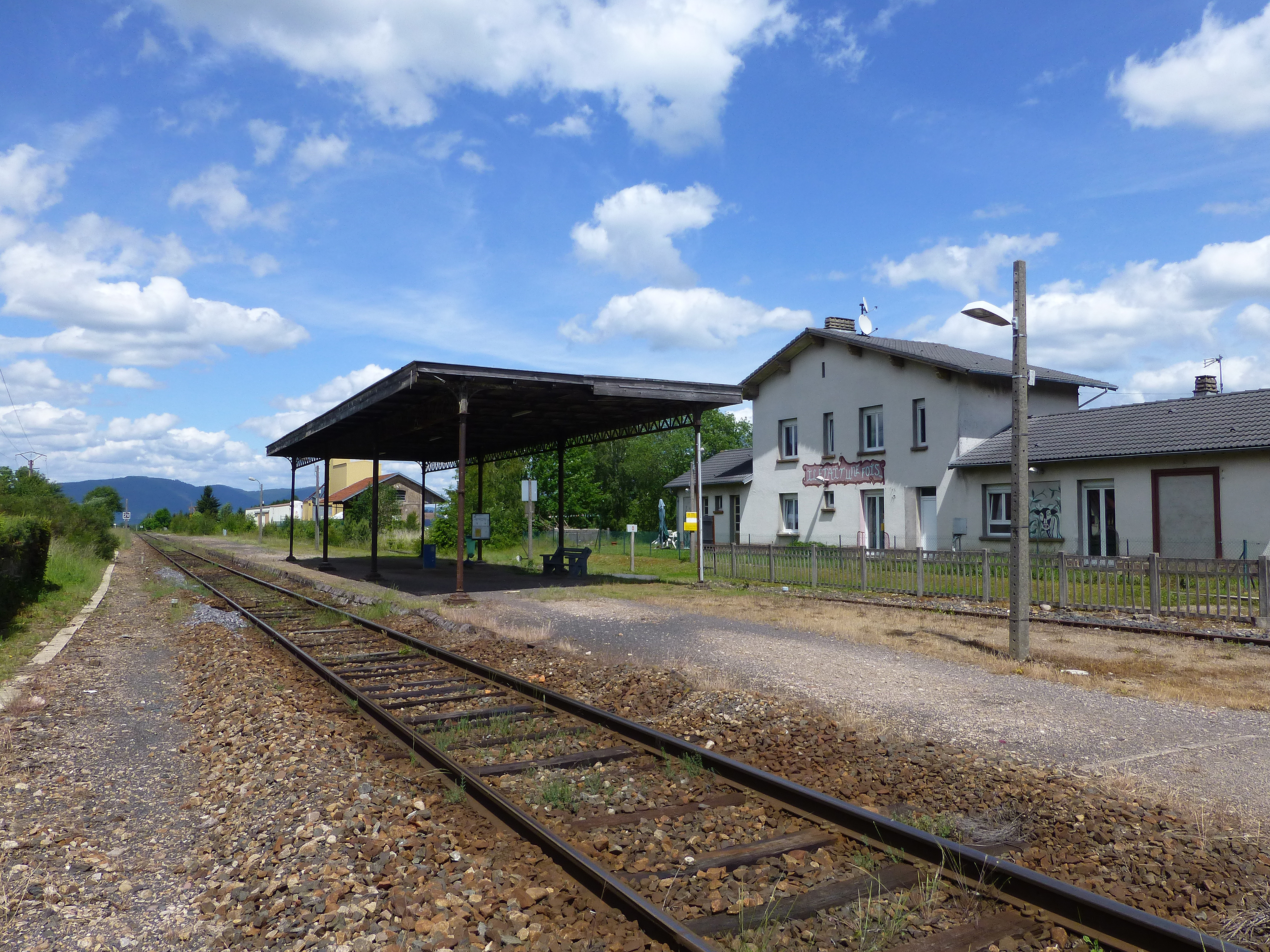 Gare de Saint-Léonard (Vosges)